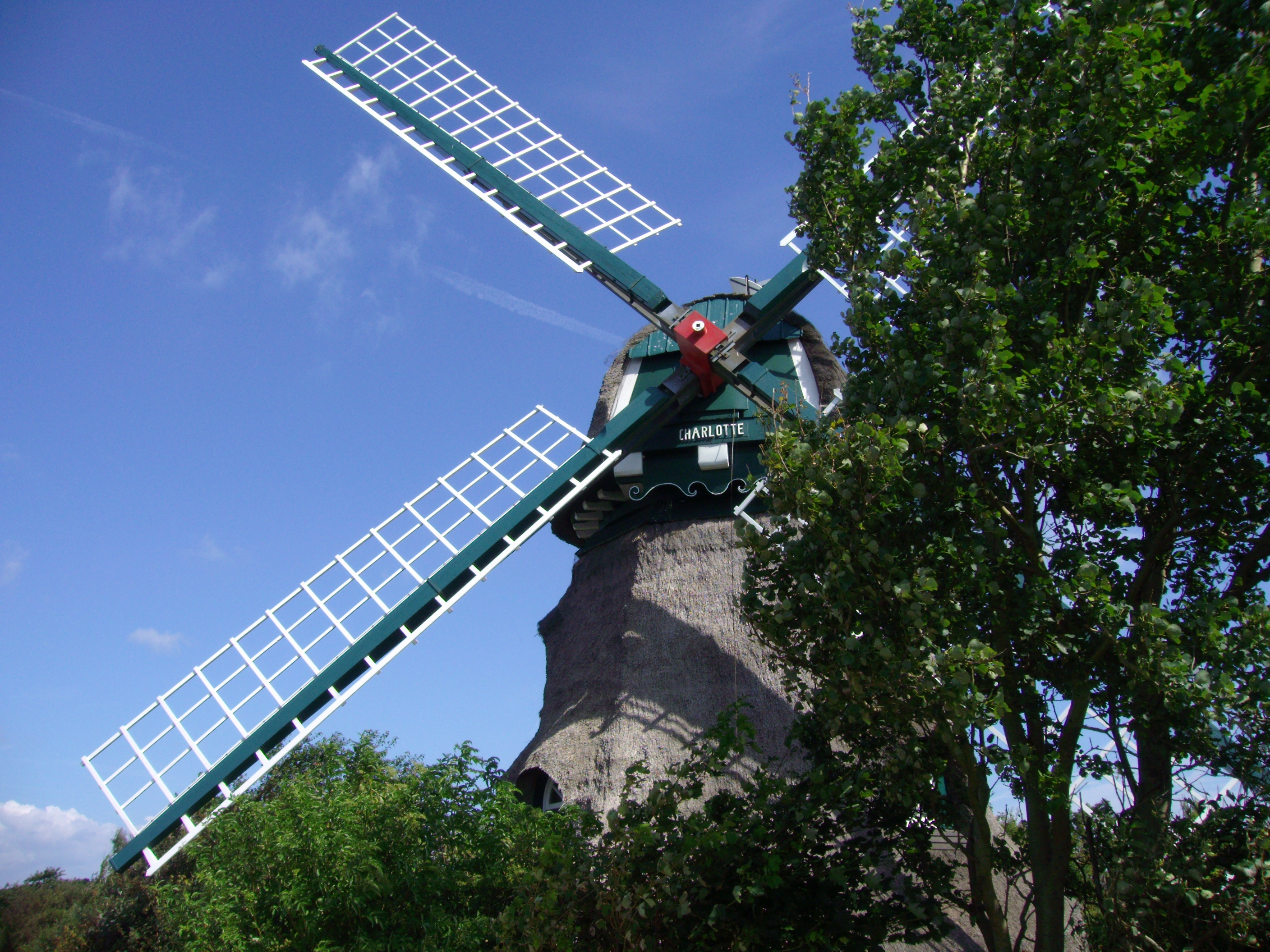 Die Windmühle "Charlotte" in Nieby, Kreis Schleswig-Flensburg.